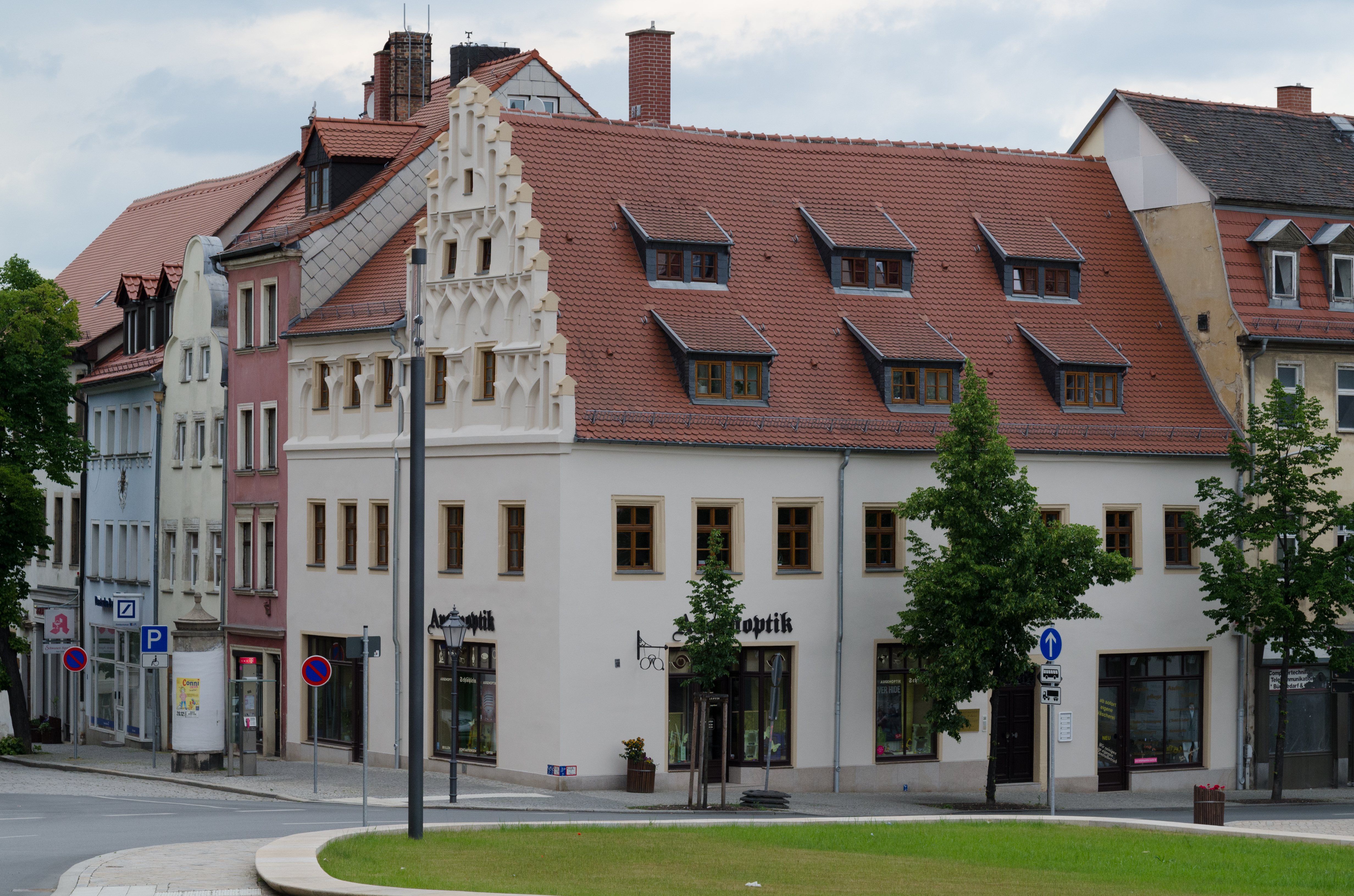 Zeitz, Altmarkt 24